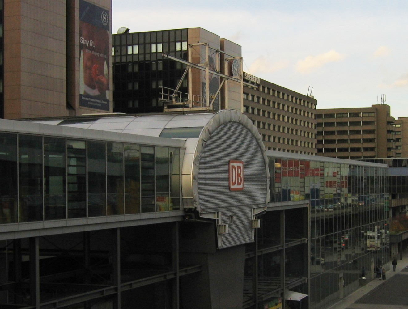 Vorbereiteter Anschluß am Flughafen Frankfurt für einen Fußgängersteg zwischen Fernbahnhof und Terminal 1.